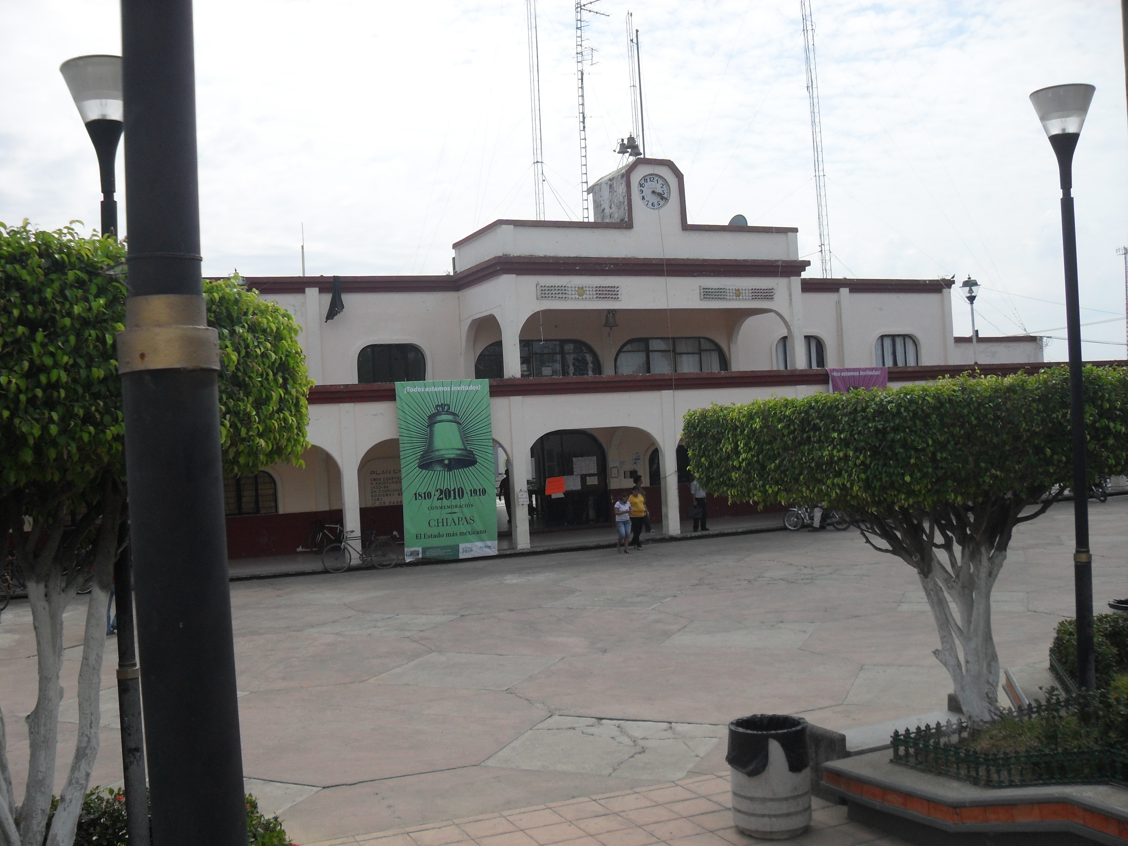 la presidencia municipal